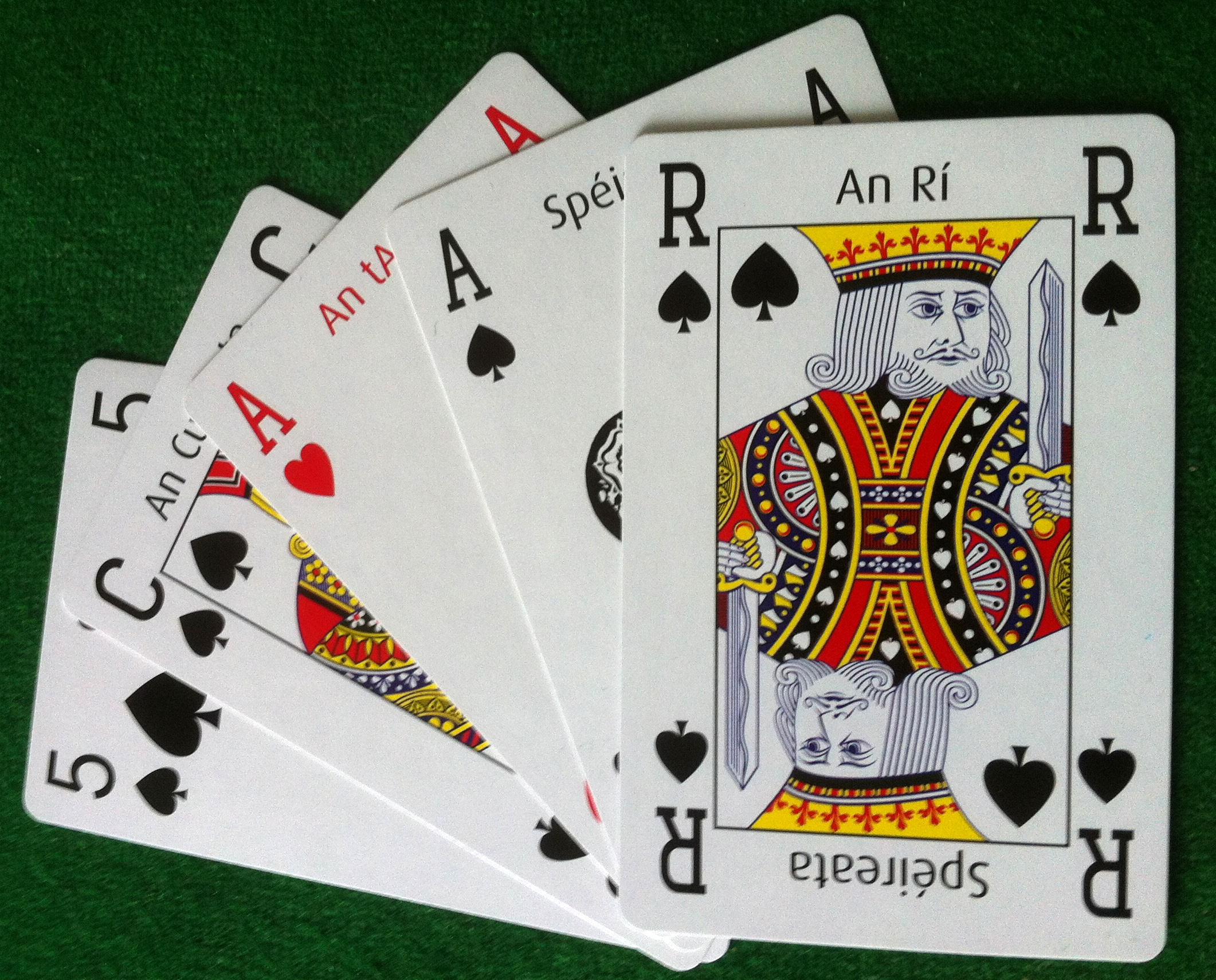 An lámh cártaí is fearr sa chluiche chúig fichead agus spéireata an mámh.